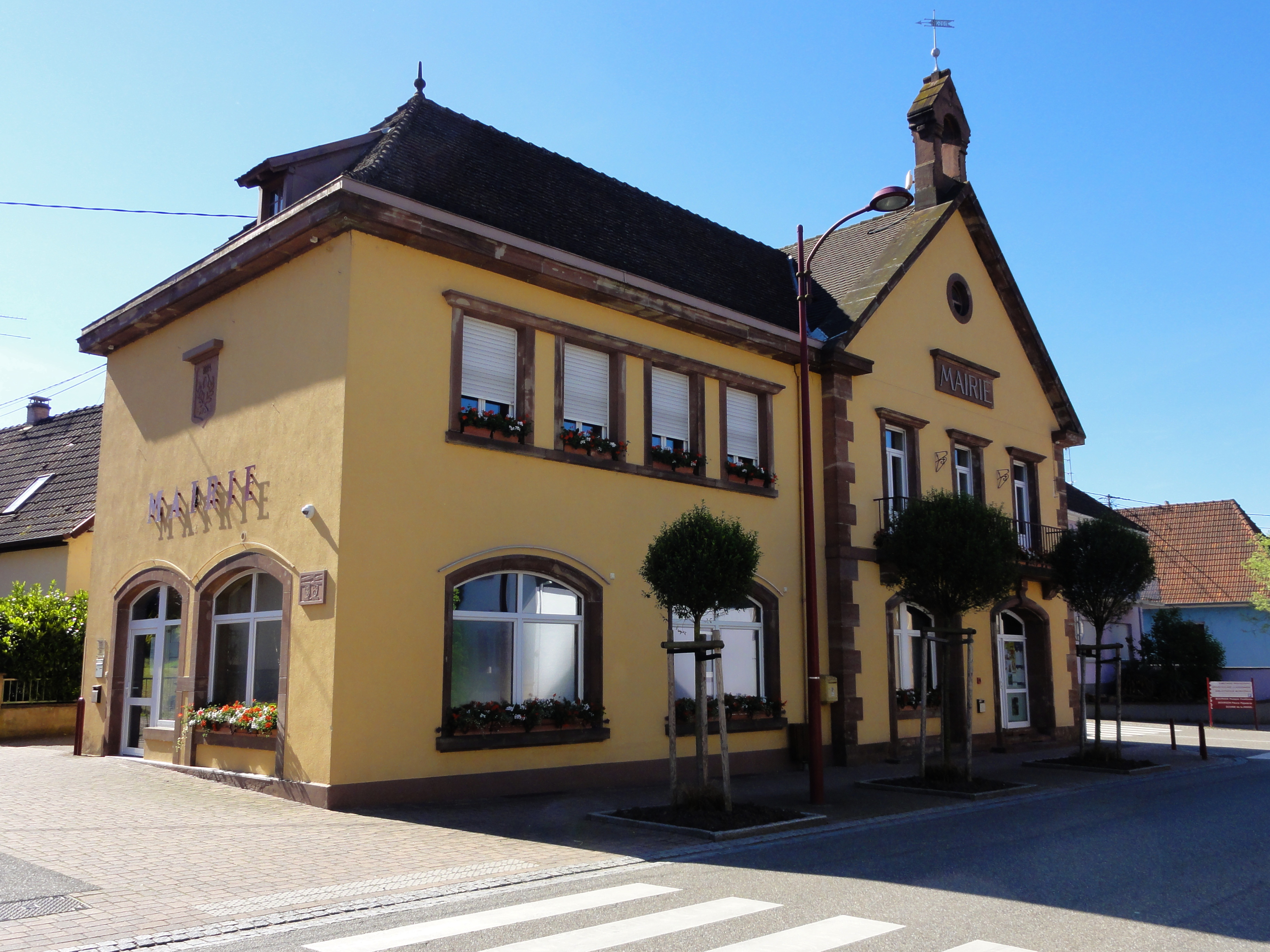 Alsace, Bas-Rhin, Mertzwiller, Mairie (XIXe-XXe), 17 rue de la Liberté.